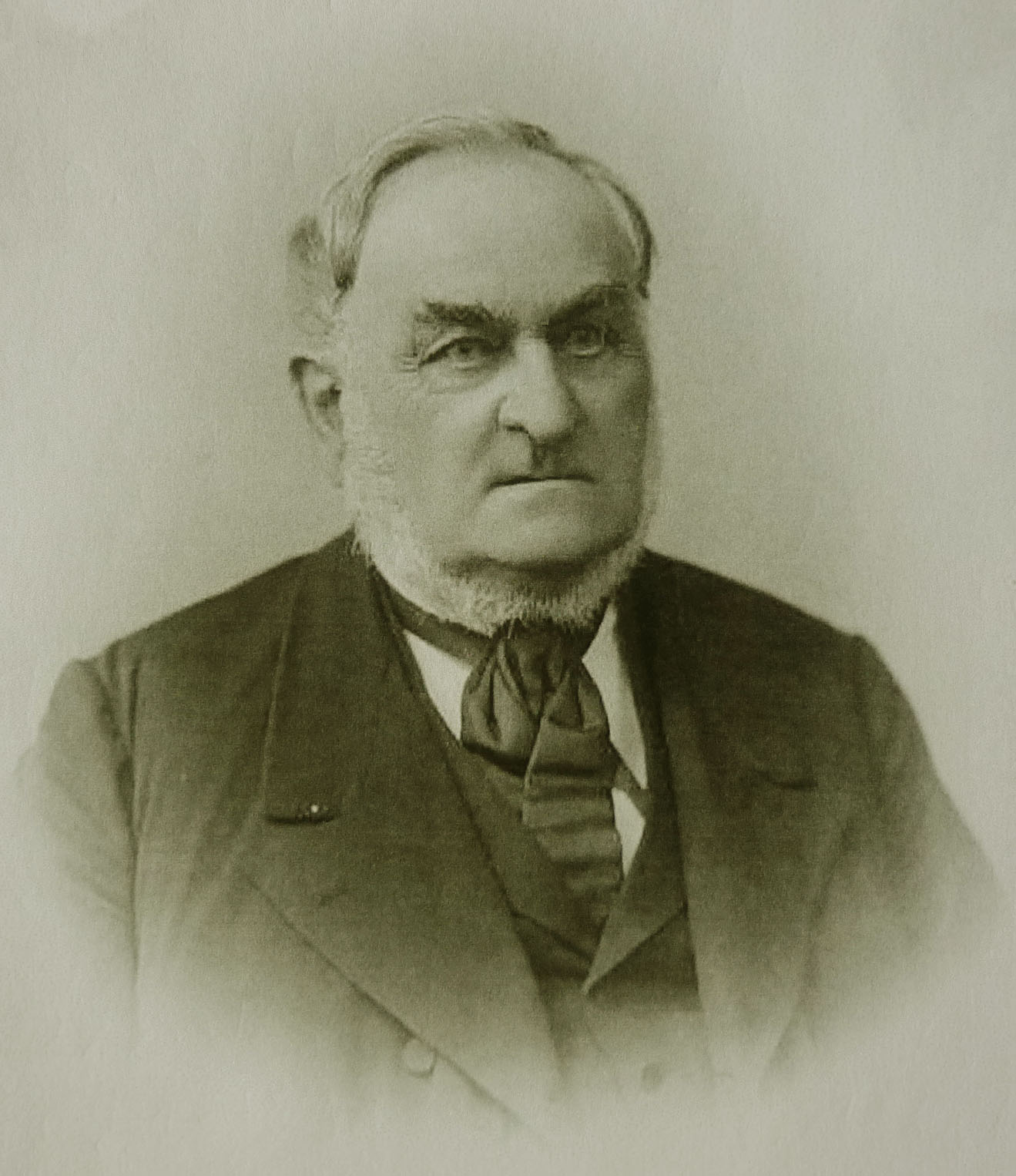 Adolf Seifert (1826 - 1910), deutsch-böhmischer Arzt und Heimatforscher in Saaz (Böhmen)